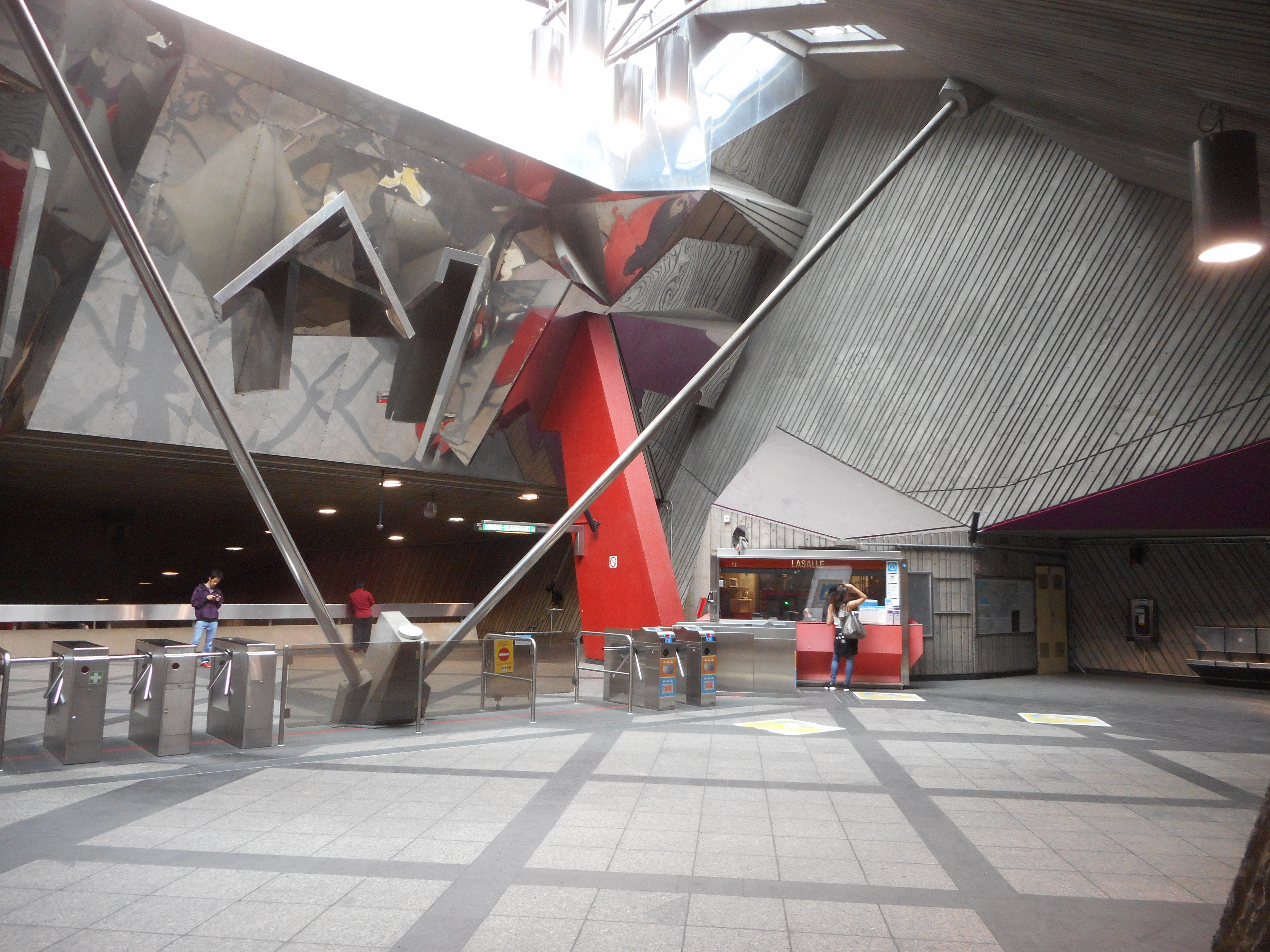 Station de métro LaSalle, Montréal